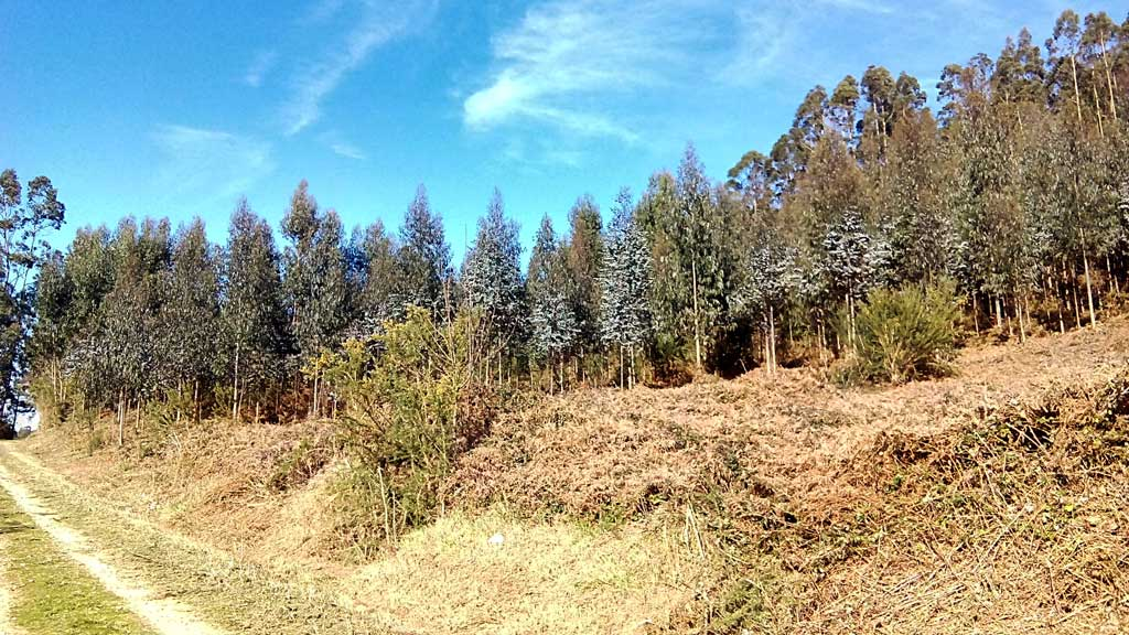 Vista do Castro de San Estevo, Sedes.